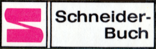 Logo eines Schneider-Buchs (Franz Schneider Verlag) vor 1985, 4,3x1,3 cm